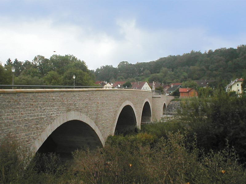 Kocherbrücke in Kochertürn, erbaut 2006